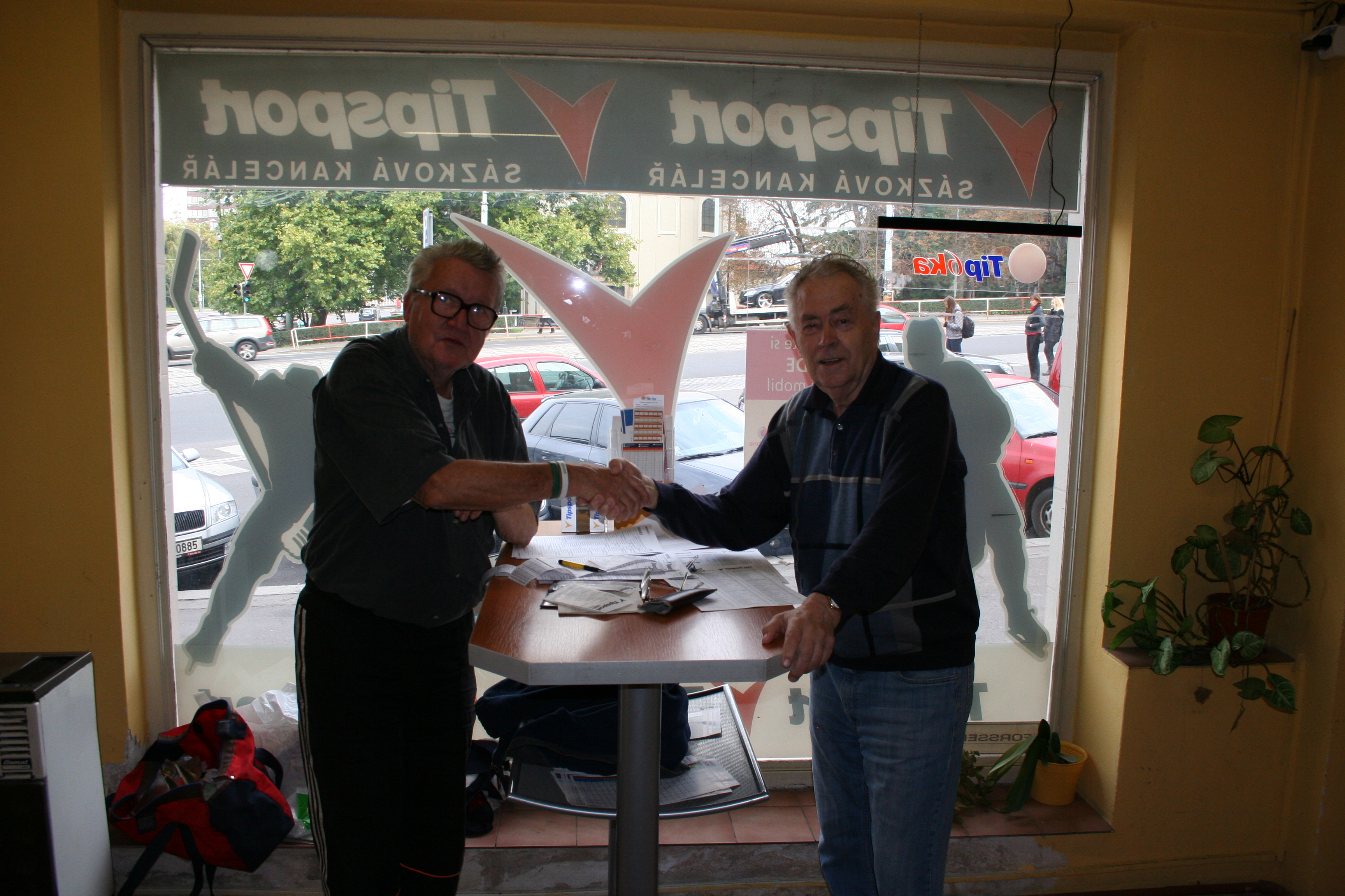 Jilemnice - Ke Stadionu, Tipsport